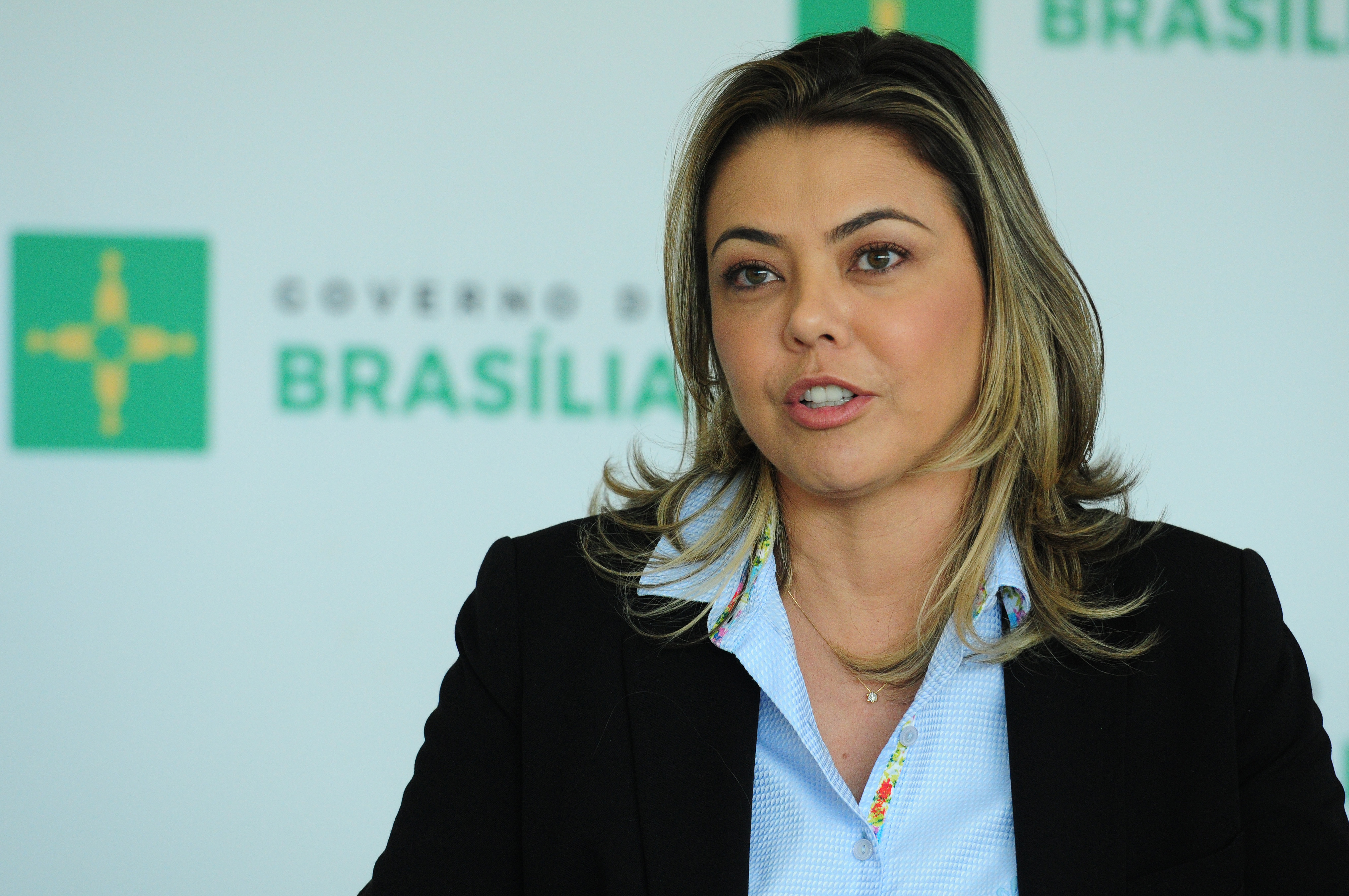 Plano Piloto, Palácio do Buriti, Brasília, DF, Brasil 29/9/2016 Foto: Pedro Ventura/Agência Brasília Atletas paralímpicos da cidade encontraram-se com o governador de Brasília, Rodrigo Rollemberg, nesta quinta-feira (29) para debater ações de incentivo ao esporte no Distrito Federal. A secretária do Esporte, Turismo e Lazer, Leila Barros.